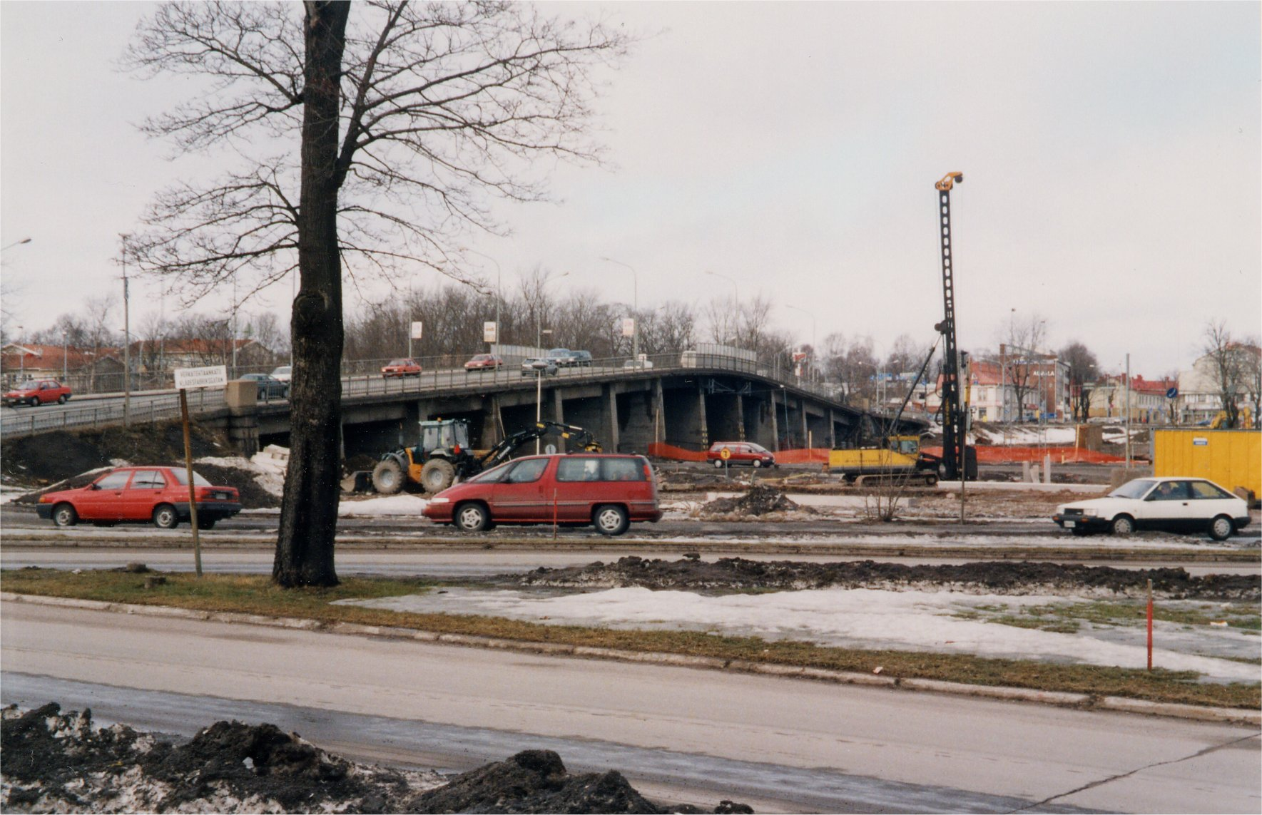 Vanha Aninkaistensilta (valmistunut 1931) Turussa keväällä 1999. Vieressä työmaata uutta siltaa varten.